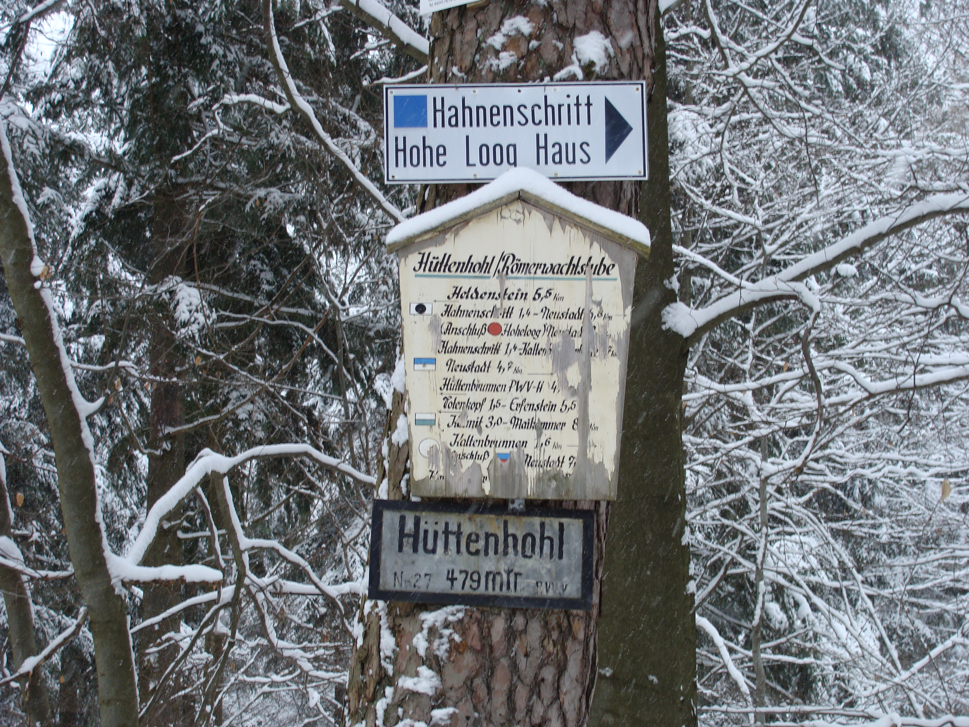 Hüttenhohl